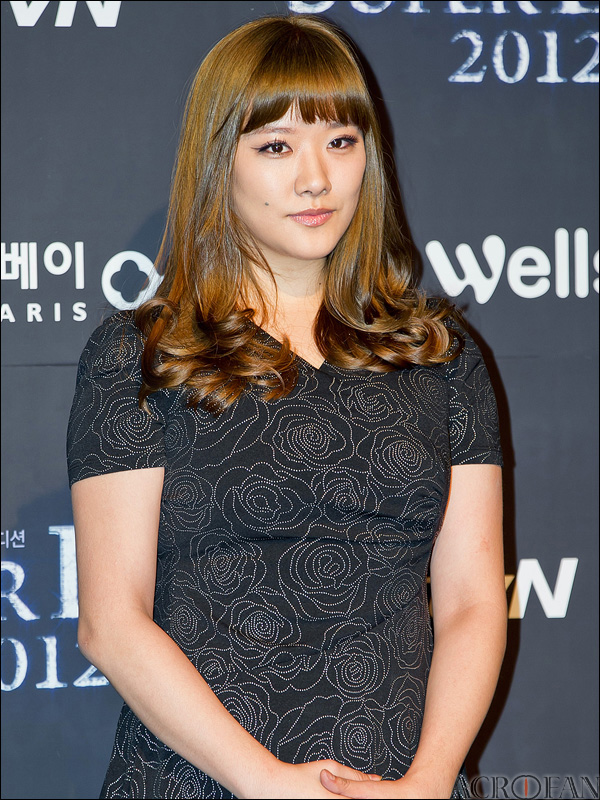 호란. tvN '슈퍼디바 2012' 제작발표회에서